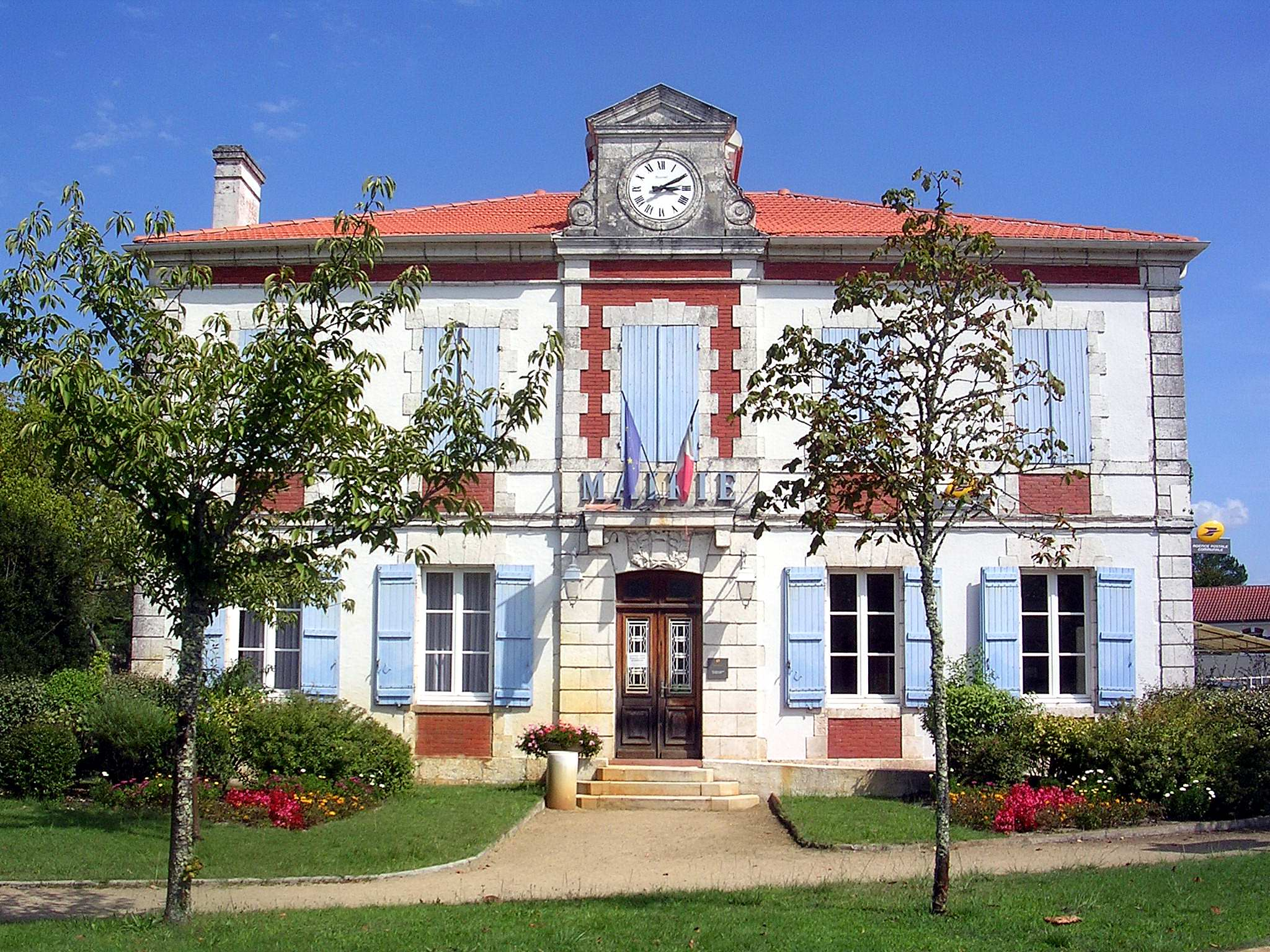 Mairie d'Escource, dans le département français des Landes